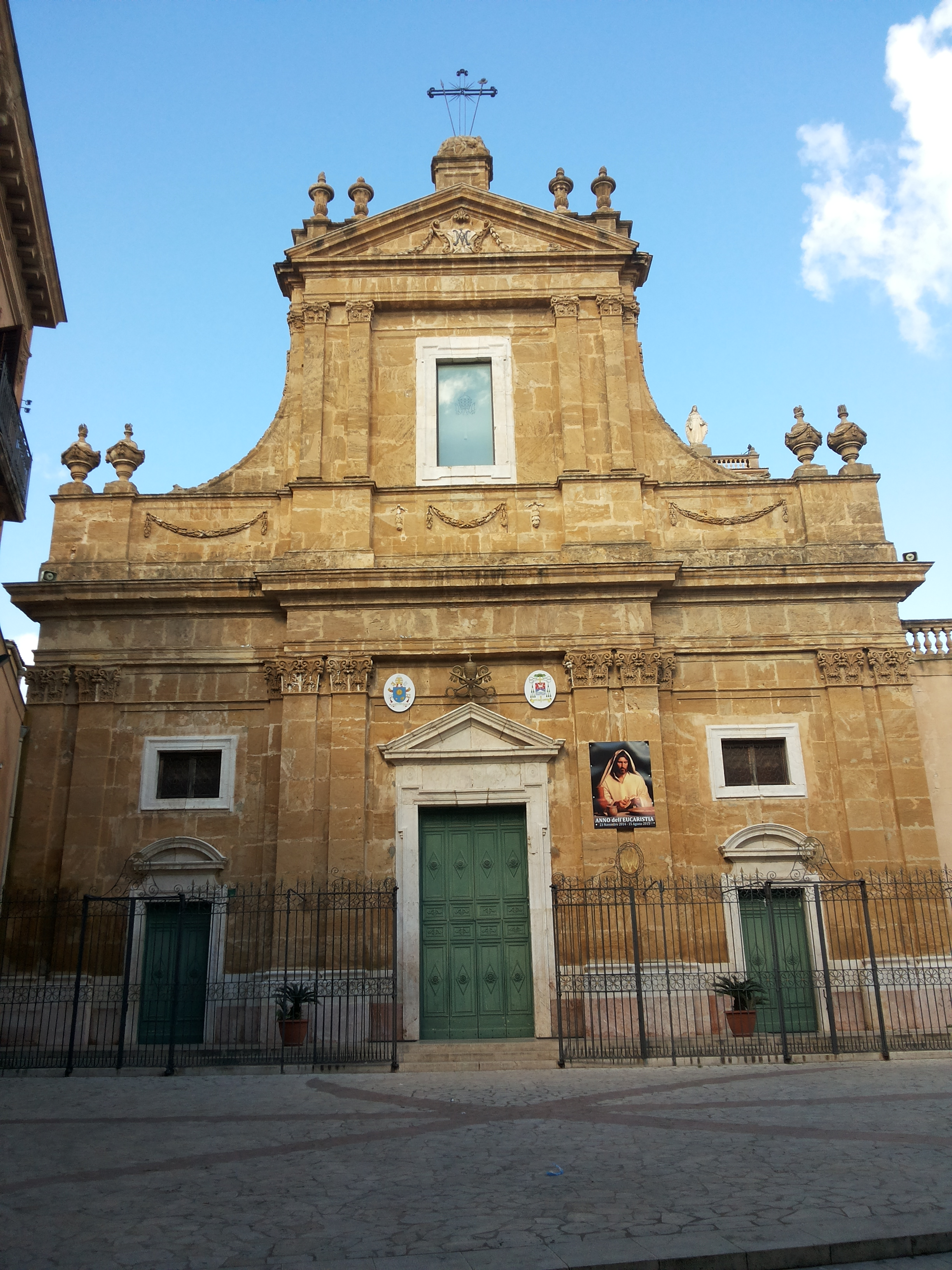 Chiesa Santa Maria Assunta (Alcamo) - Facciata